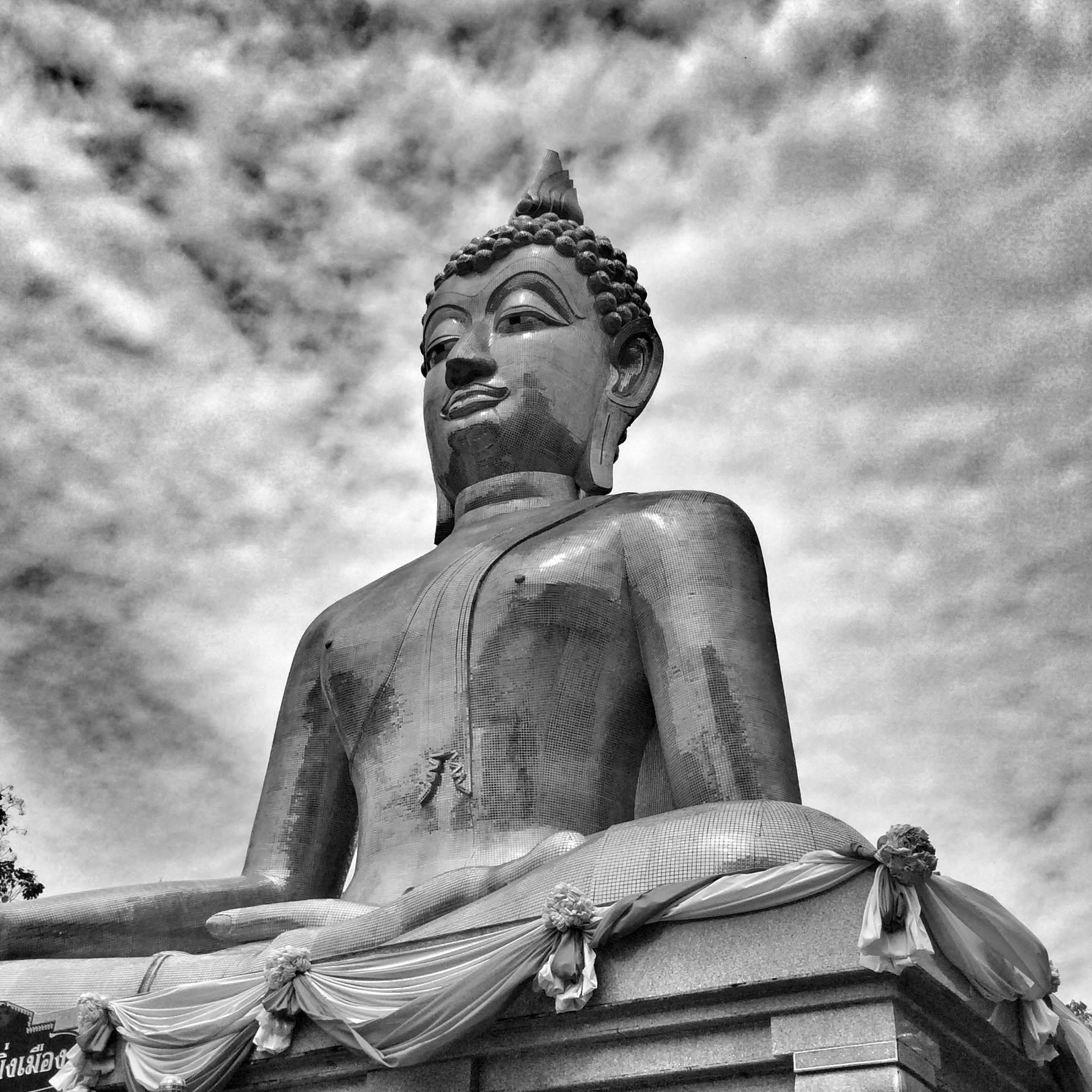 พุทธอุทยานและพระมงคลมิ่งเมือง อำนาจเจริญ